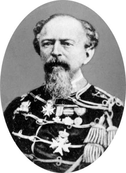 Generaal Pel